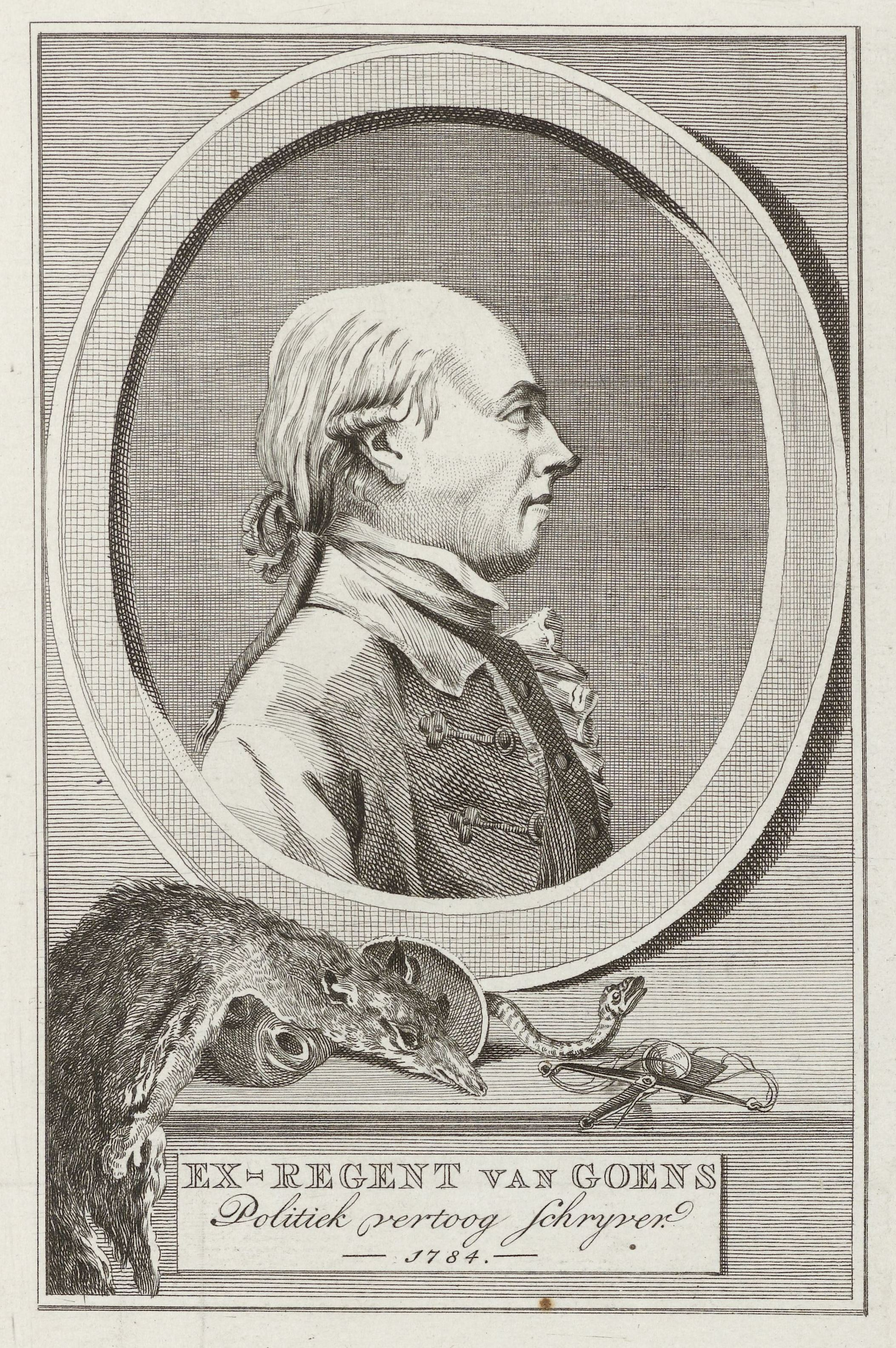 Portret van Rijklof Michael van Goes, 1782. Tekst: Ex-regent van Goens/ Politiek vertoog schryver. 1784. Bij het portret van R.M. van Goens liggen een wolfsvel, maskers, slang en weegschaal voor goud (symbool van zijn omkoopbaarheid). Bij het portret behoort een blad met spotverzen uit 1782.